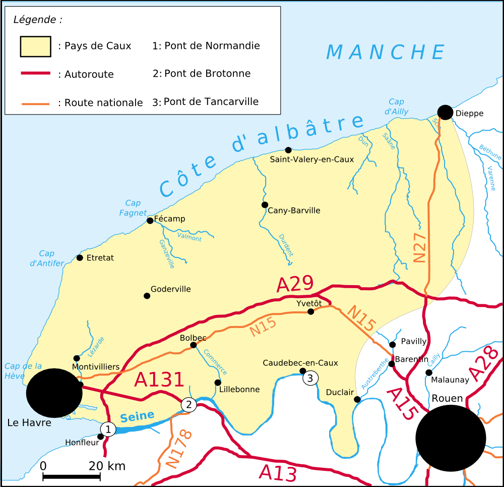 Carte des routes du Pays de Caux